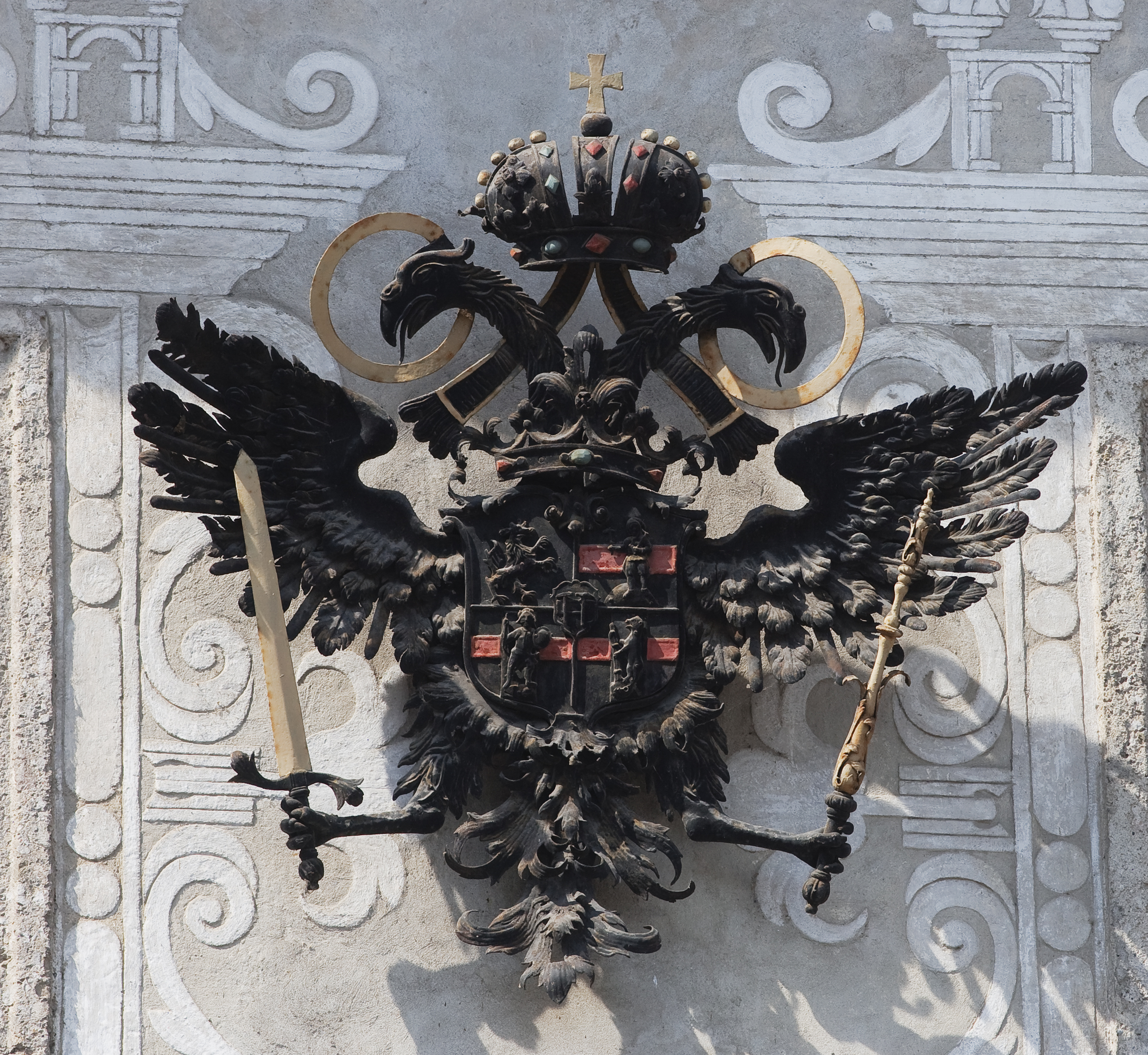 Fassade des Steyrer Innerberger Stadels: Doppeladler mit Wappen der Eisengewerkschaft